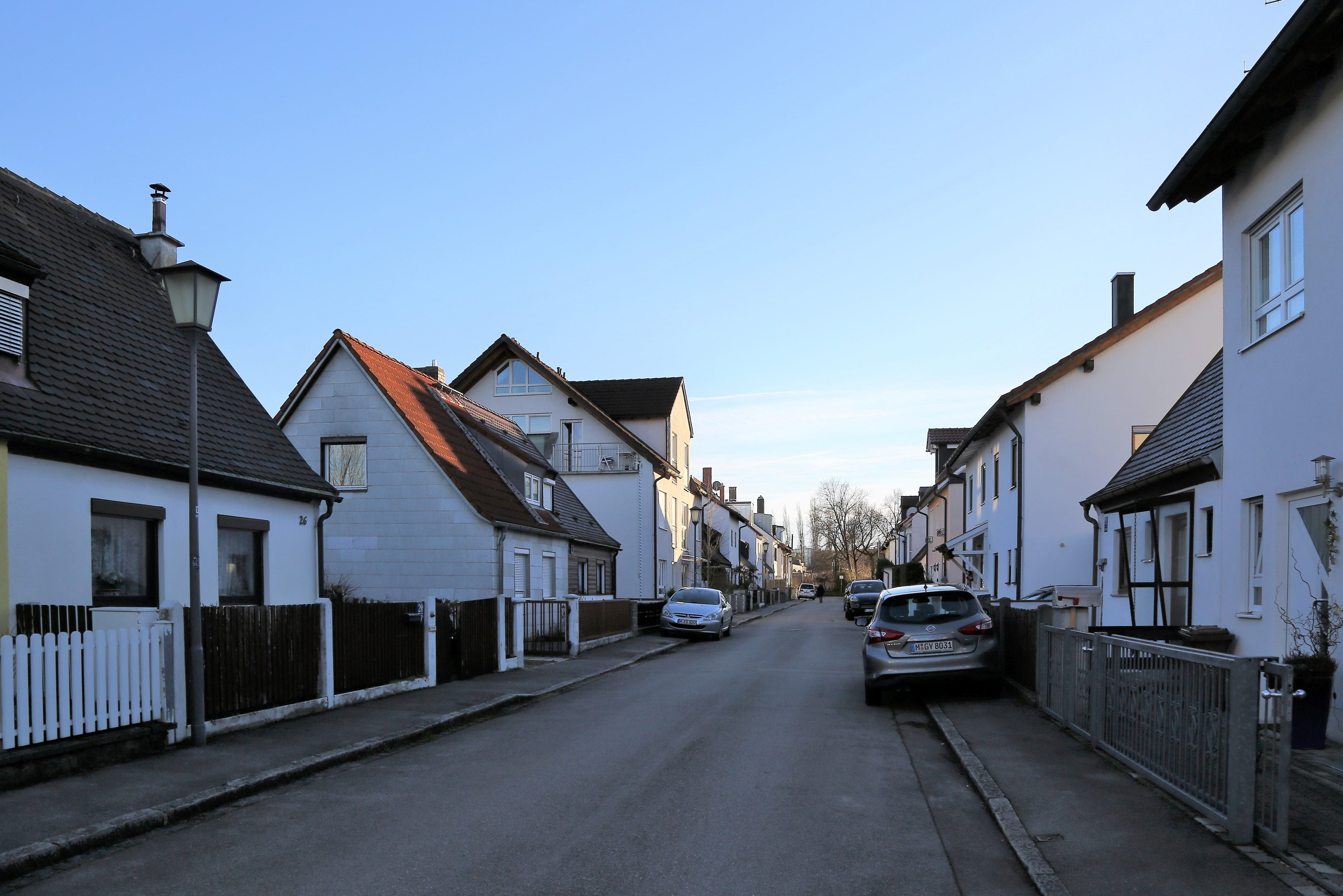 Momentaufnahme der Kolonialsiedlung im Dezmeber 2017